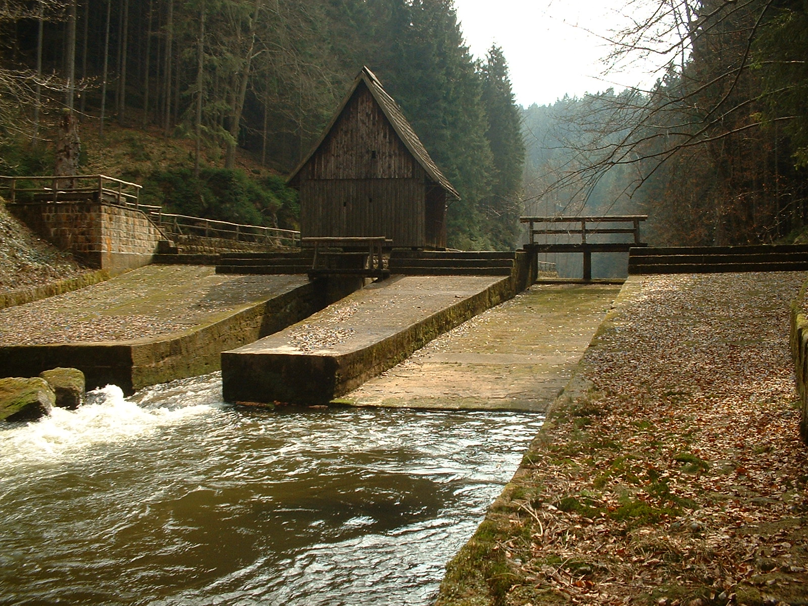 Die Kirnitzsch (tschechisch: Křinice) ist ein Fluss im Elbsandsteingebirge mit der Quelle in Tschechien und der Mündung in Deutschland. Auf diesem Bild ist die Untere Schleuse zu sehen, mit der früher Wasser angestaut wurde, um Holz zu flößen. Mit ihrer 32 m breiten Staumauer kann sie auf der mittlerweile versandeten 750 m Staulänge ca. 28.000 Kubikmeter Wasser zurückhalten. Ihre Wasserpforte in der Schleusenmitte und das kleine Wehr sind auch heute noch funktionstüchtig und werden durch Einschieben von Versatzhölzern vor allem beim Einsetzen der Schneeschmelze als Hochwasserschutz genutzt. Dazu werden, wie auch beim Flößen, Floßhaken benutzt, deren Aufbewahrungsort der hölzerne Aufbau darstellt. Von 1985 bis 1993 rekonstruierten Waldarbeiter die zerfallene Anlage und leisteten damit einen wichtigen Beitrag zur Denkmalpflege. Nach einigen Überlegungen wurde aber beschlossen, die Staustufe Untere Schleuse zugunsten der in der Kirnitzsch lebenden Tierwelt nicht weiter auszubauen.